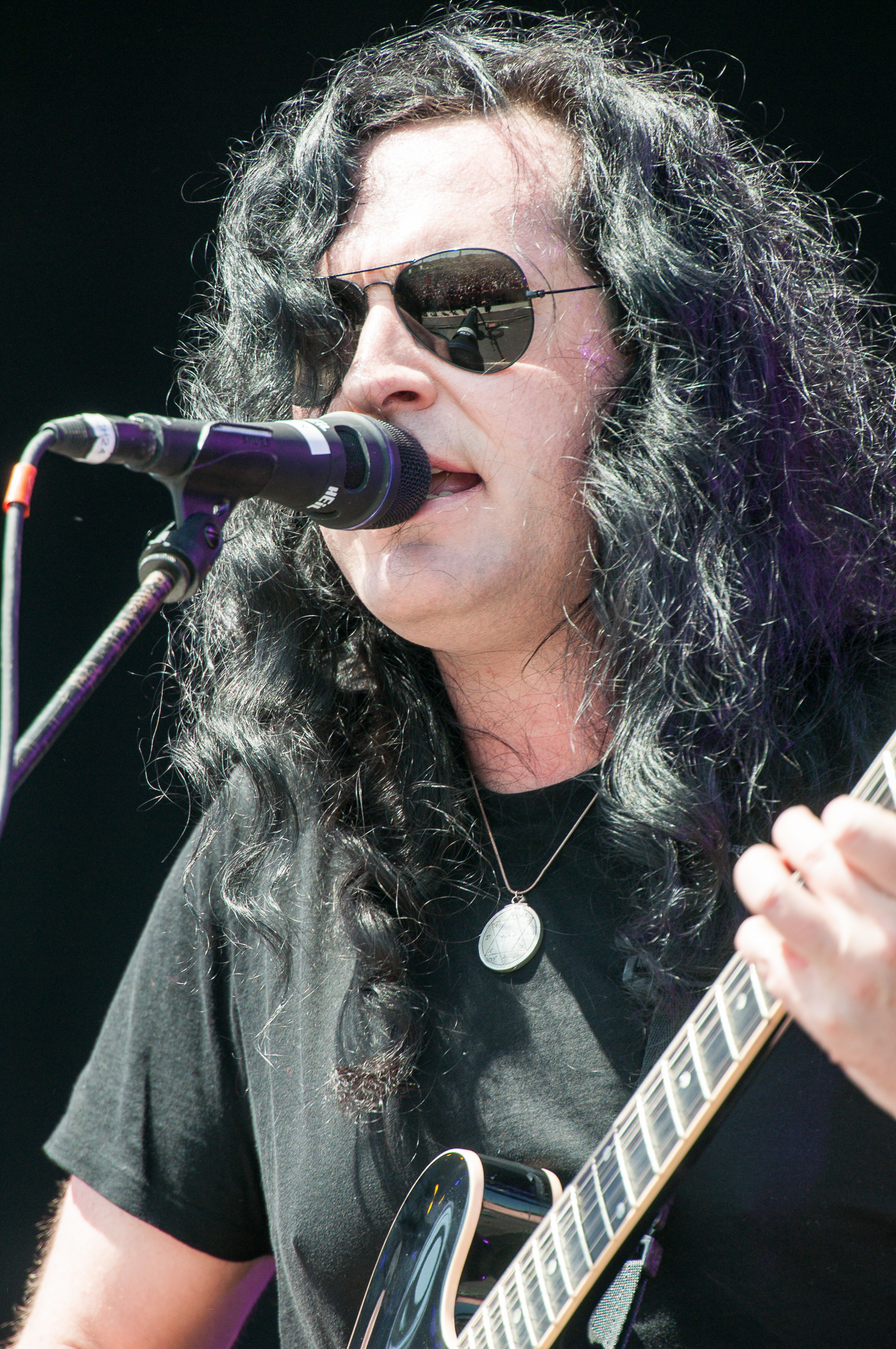 ARGO-Konzerte,Ben Philips,Centerstage,Konzert,Livekonzert,Livemusik,Musik,RiP,Rock im Park 2014,The Pretty Reckless